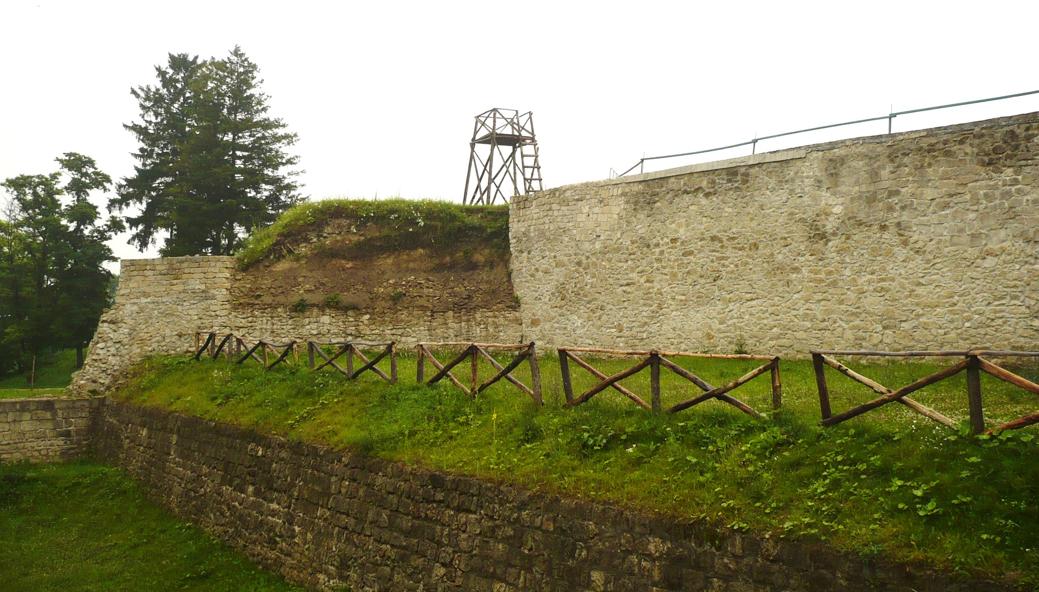 Zbaraż, mury zamku